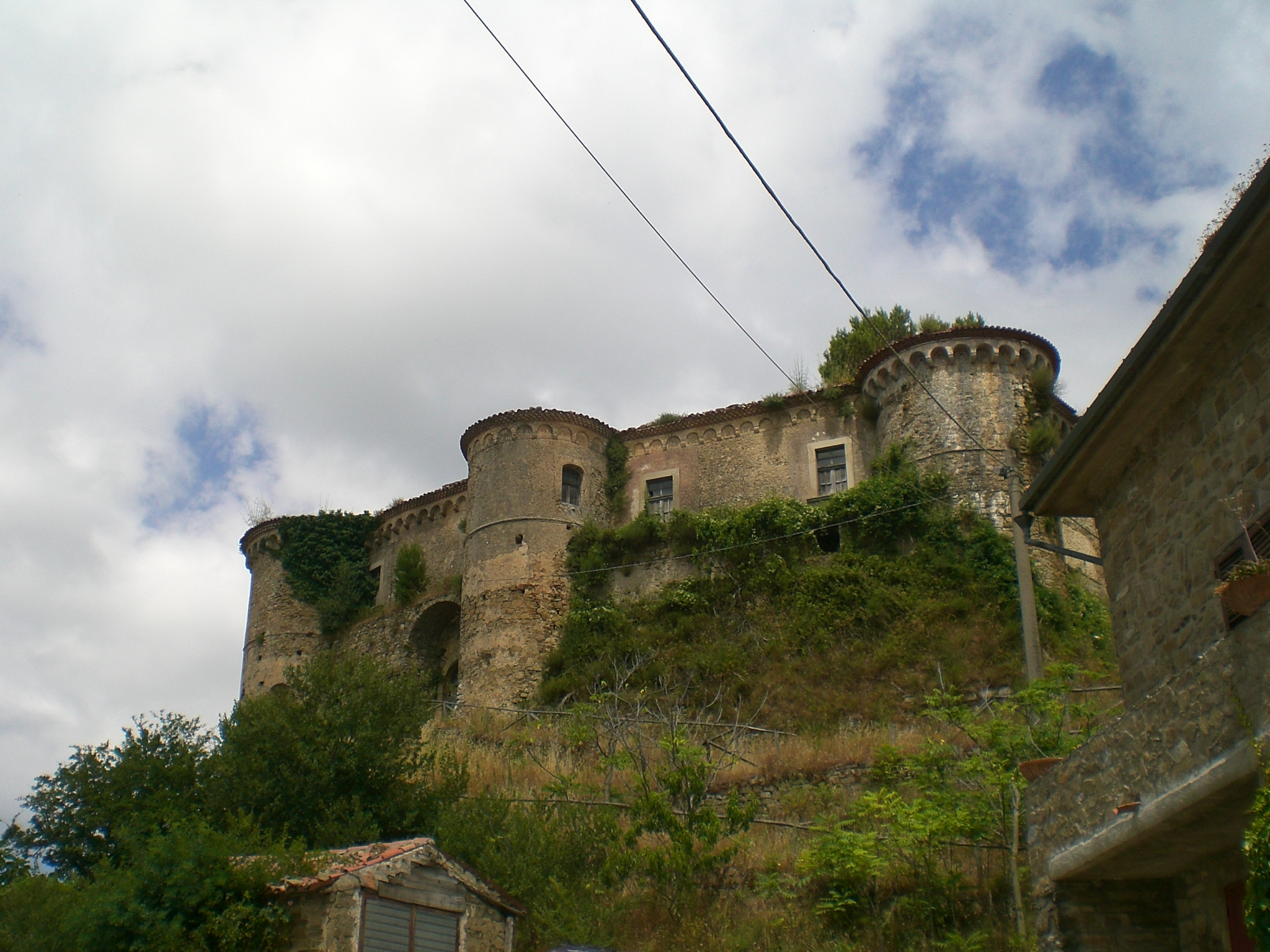 Il castello di Rocca Cilento, frazione di Lustra